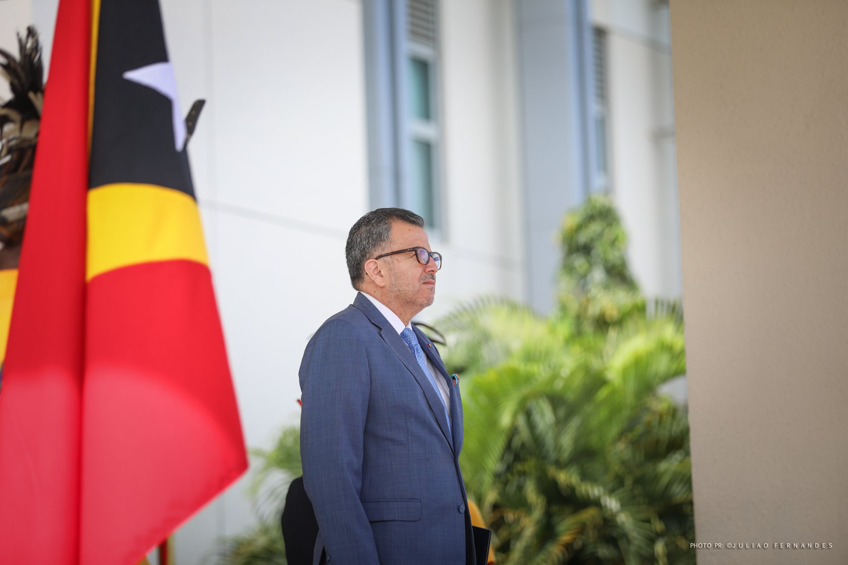 Gustavo Ayares Ossandón bei der Übergabe seiner Akkreditierung als chilenischer Botschafter bei Osttimors Präsident Francisco Guterres